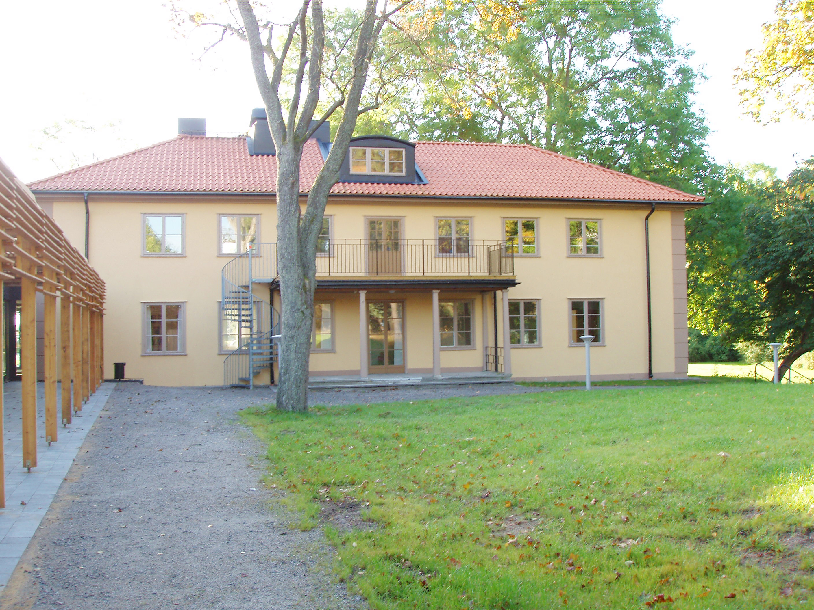 Carl Malmstens skolan-Furniture Studies på Lidingö, invigd 18 september 2009, ihopbyggd med Bodal gårds gamla herrgårdsbyggnad.